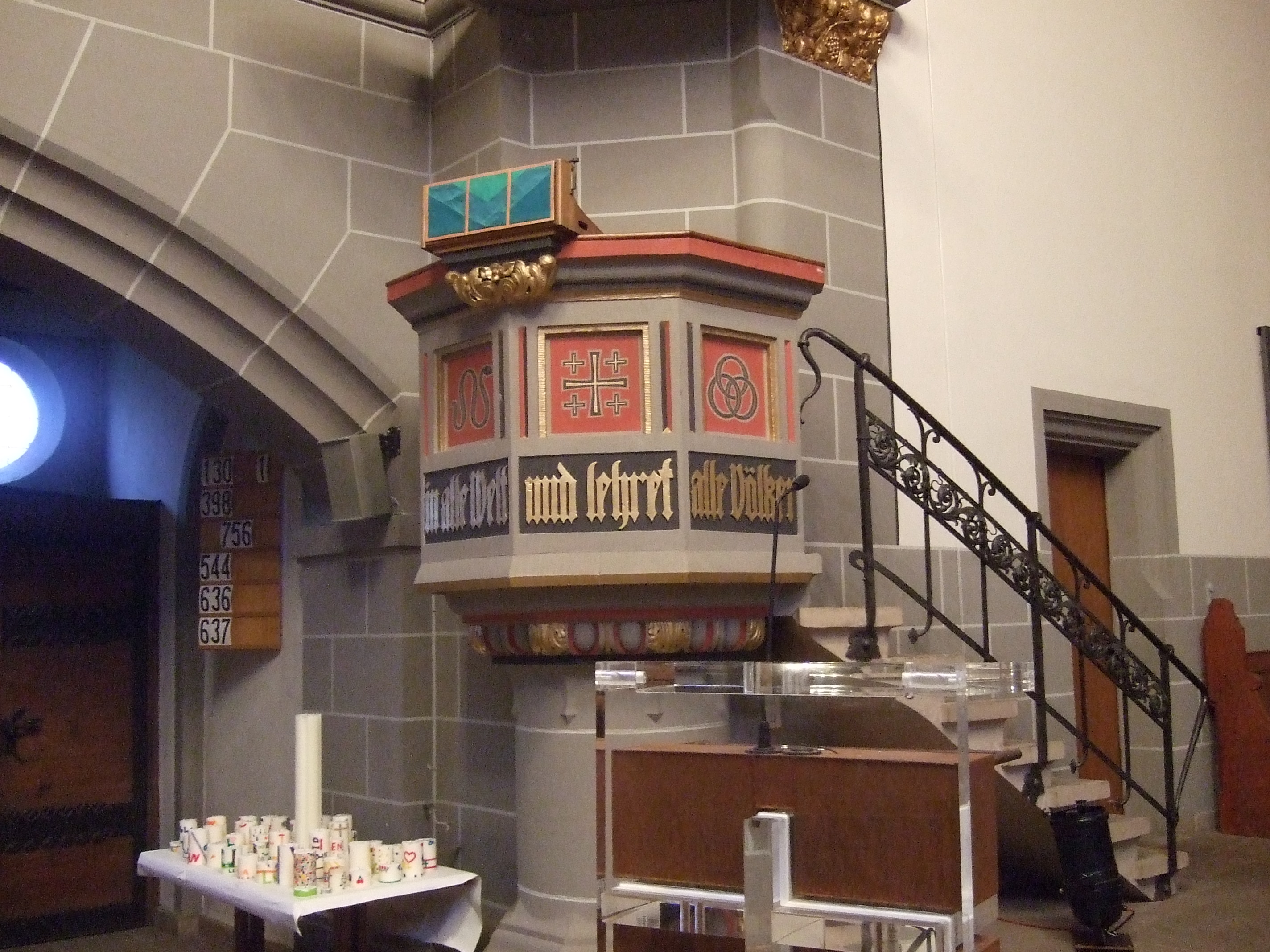 Kanzel der Christuskirche Kassel